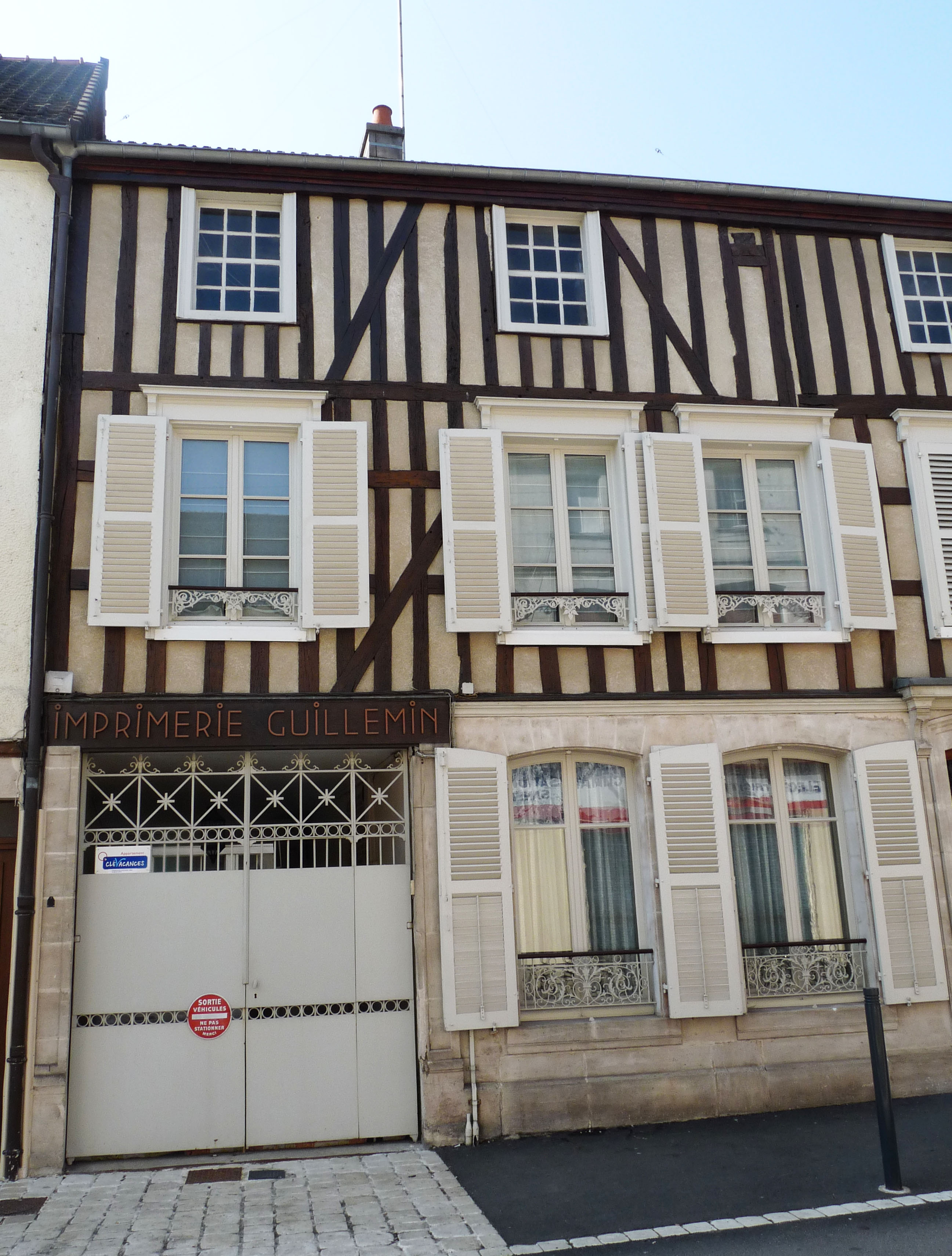 Imprimerie Guillemin, créée en 1833, à Wassy (Haute-Marne).